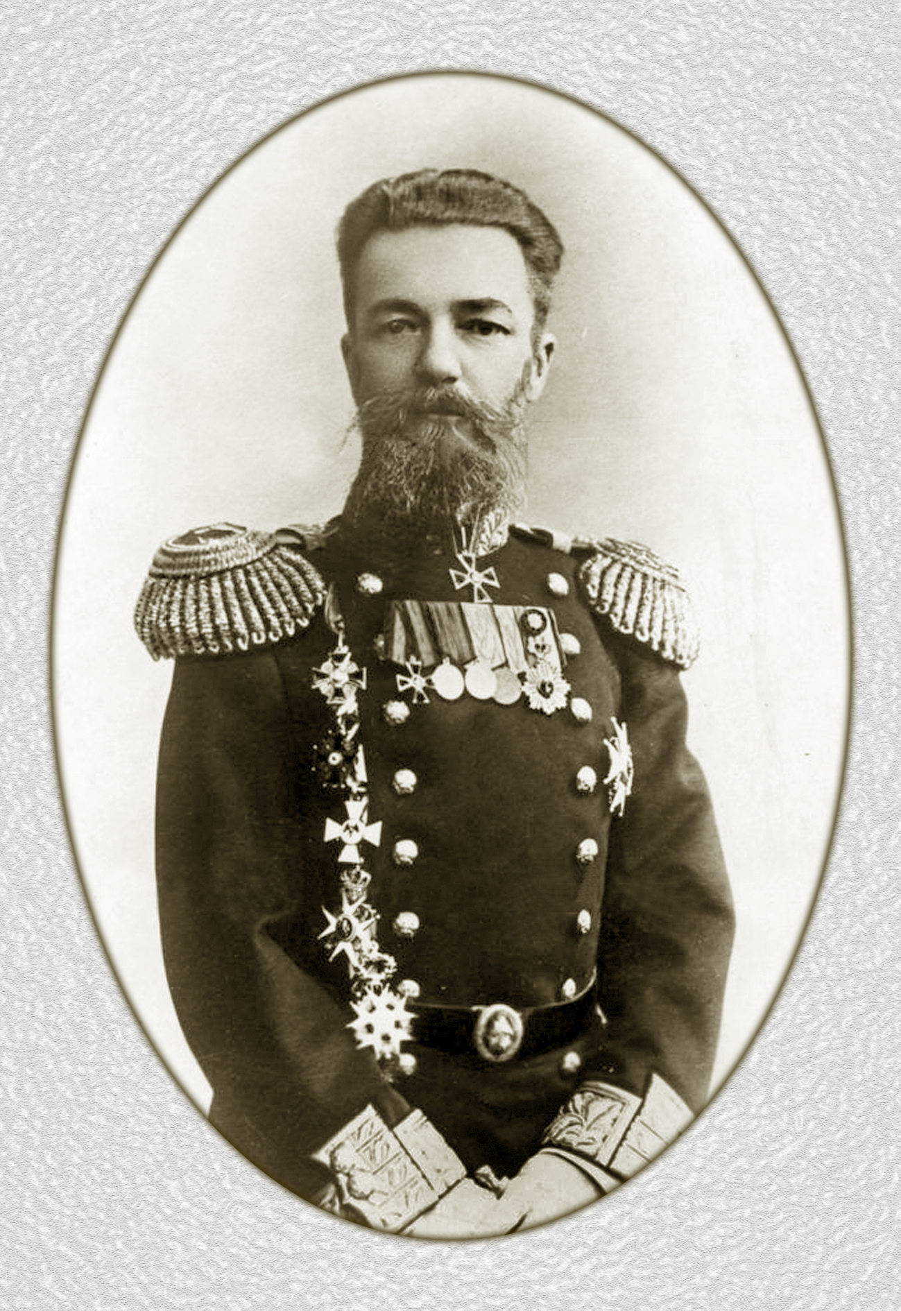 Андрей Андреевич Вирениус вице-адмирал